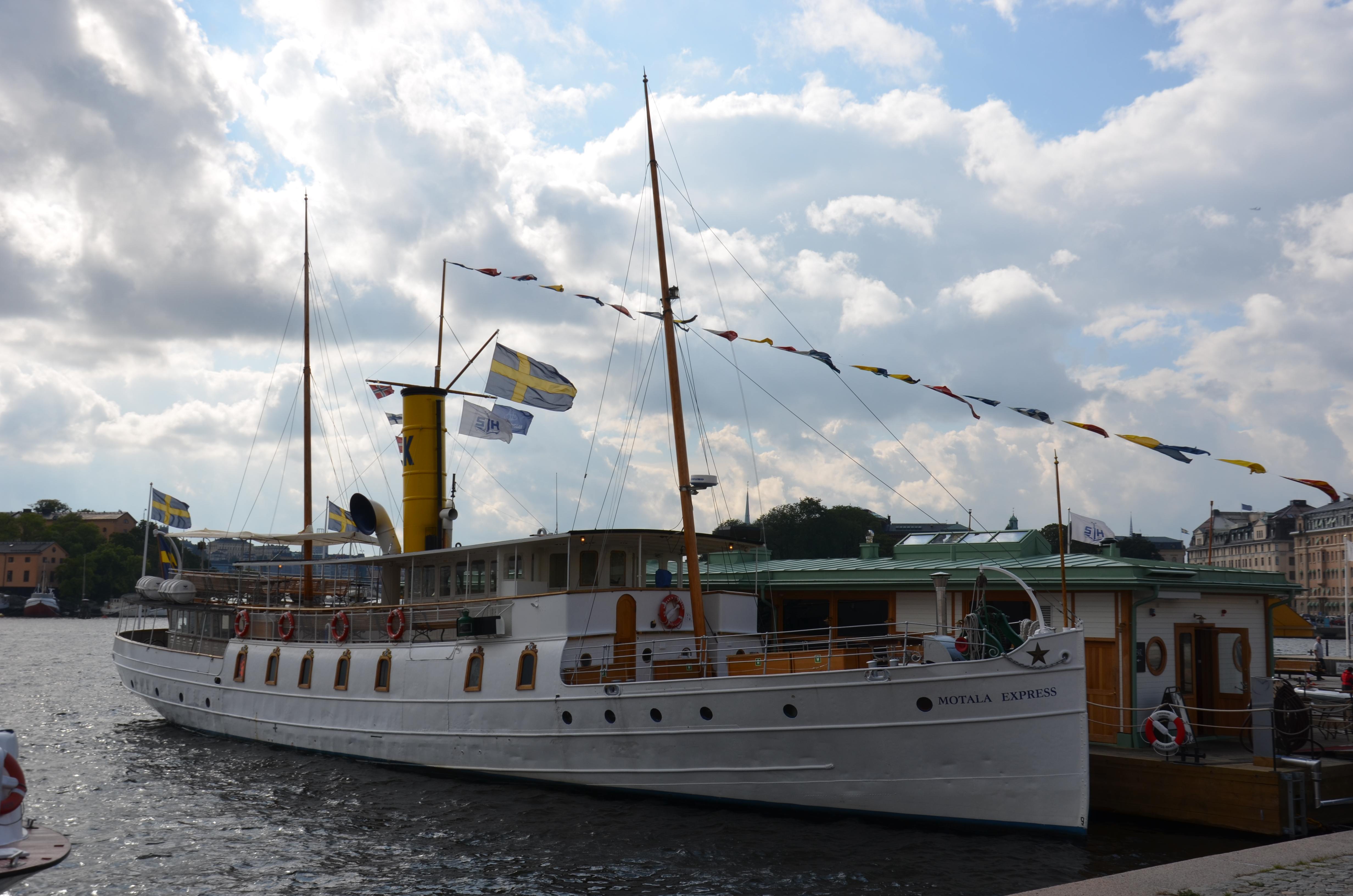 S/SA Motala Express vid kaj vid Strandvägen i Stockholm